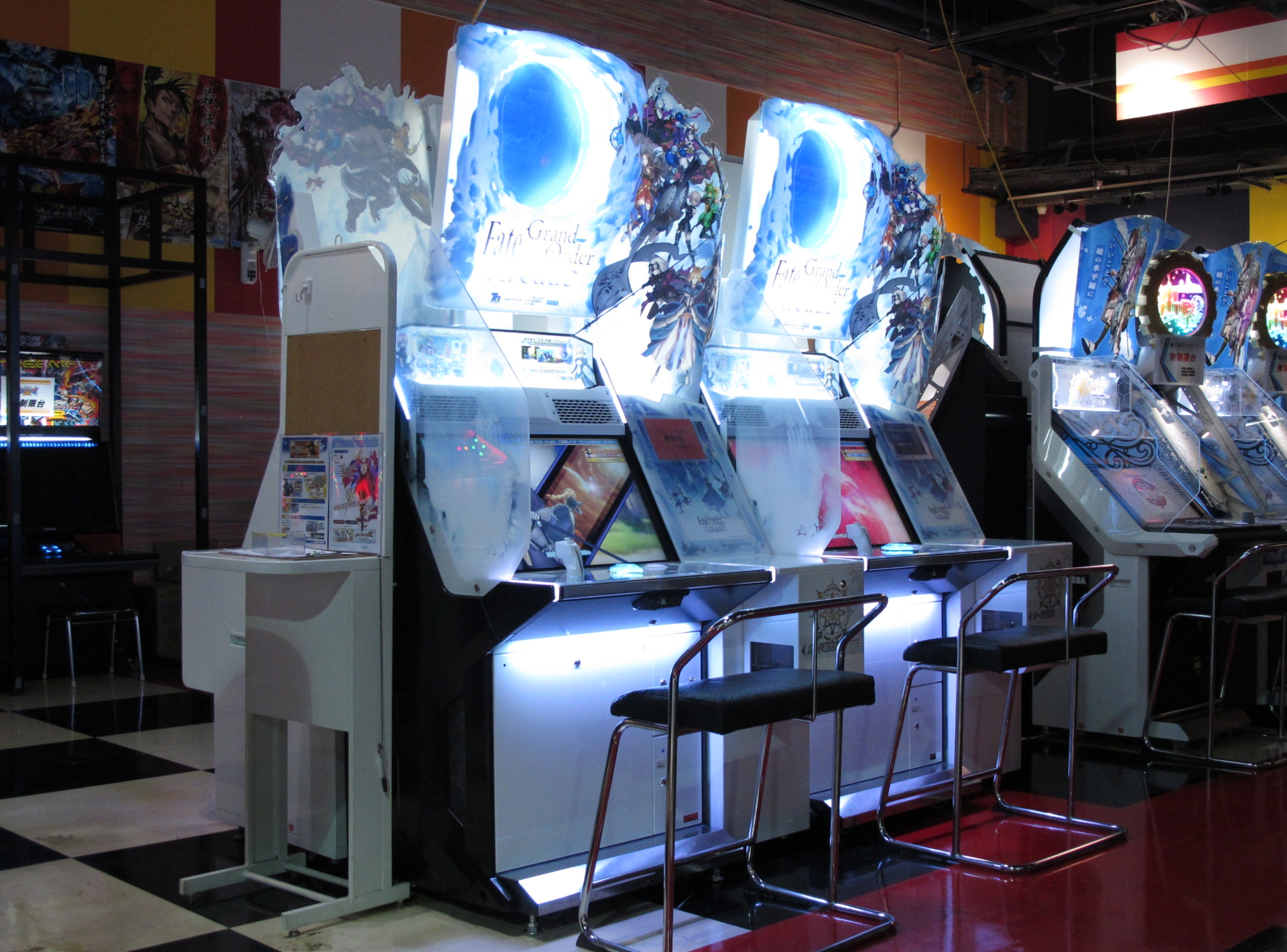 セガのアーケードゲーム『フェート・グランドオーダー アーケード』の筐体。